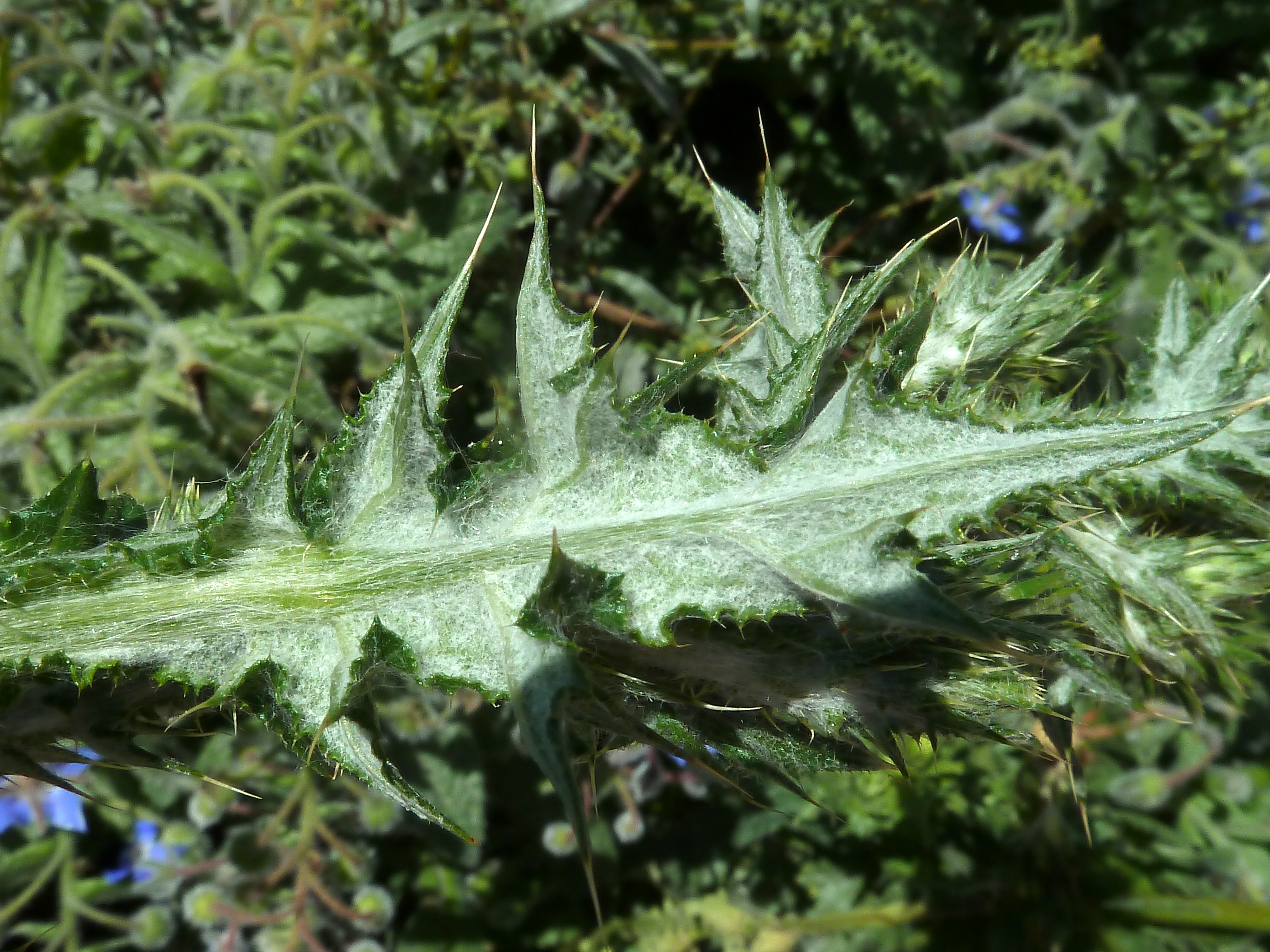 Carduus pycnocephalus (Cardo, cardo borriquero, cardo negro) - Hoja caulinar: envés. - Descampado circa Biblióteca, Albatera (Provincia de Alicante, Espàña).